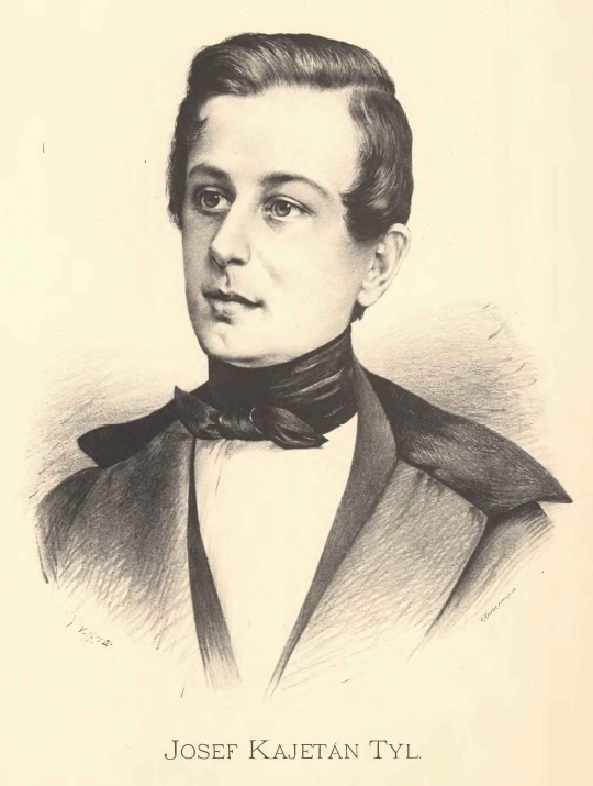 Portréty předních osobností od Jana Vilímka